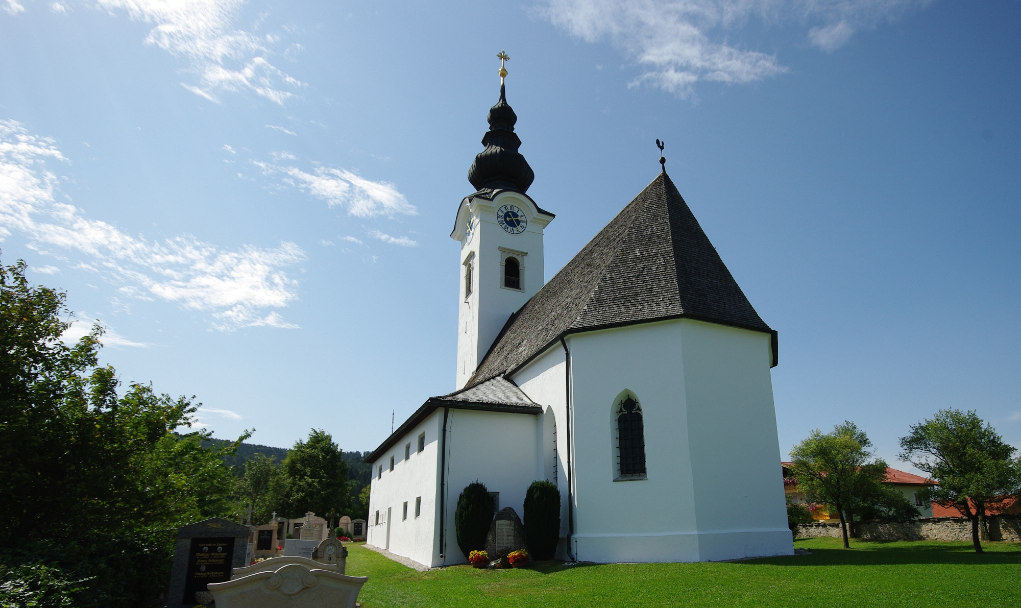 Ulrichshögl 13a, 83404 Ainring; Kath. Pfarrkirche St. UlrichThis is a photograph of an architectural monument.